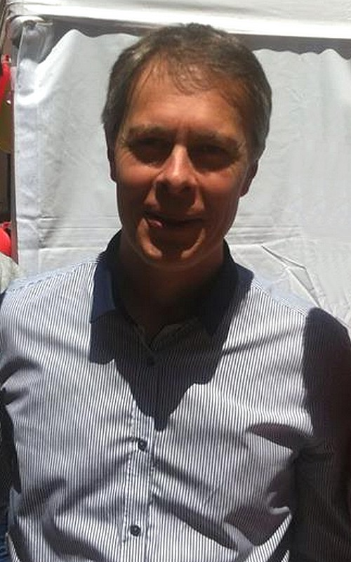 Vincent Ducreux, juin 2013.